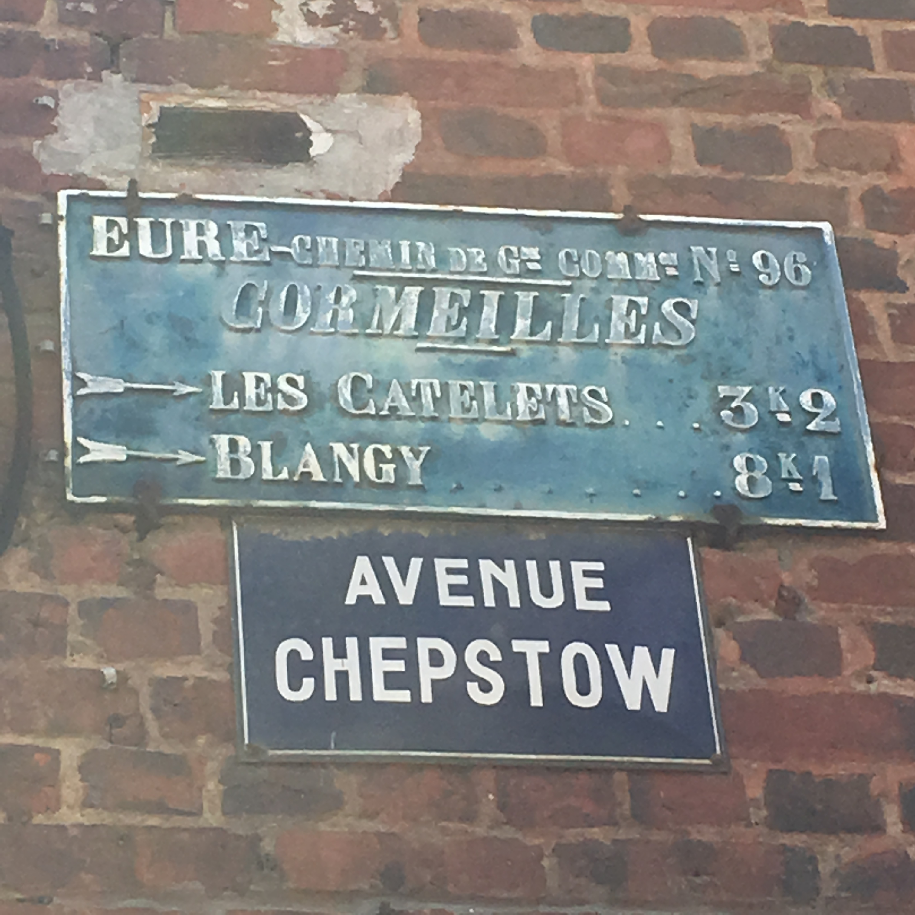 Cormeilles (27), plaque de cocher